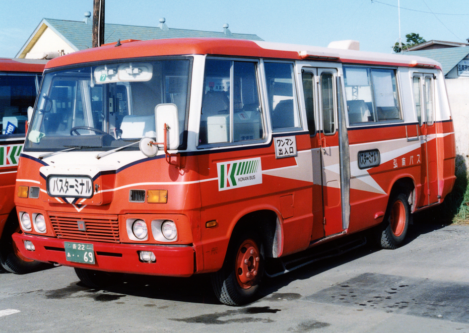 弘南バス いすゞ・ジャーニーM 2ドア仕様 P-BL36